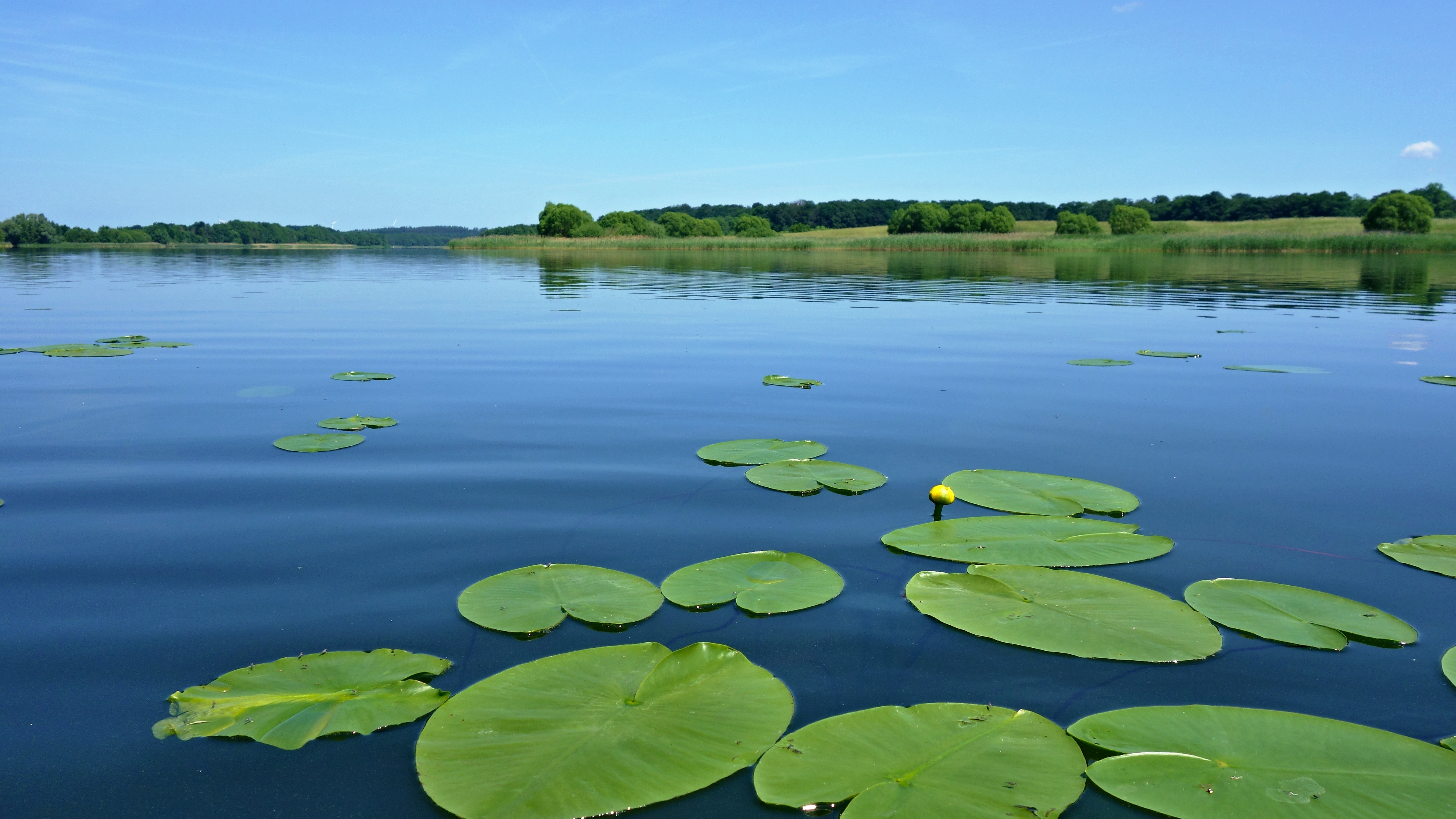 Blick über den See von Süden am Ortsausgang Hohen Sprenz. Teil des Landschaftsschutzgebiets "Dolgener und Hohen Sprenzer See" (L 28a)